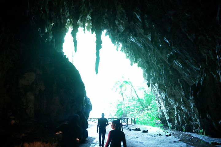 Salida de la Cueva del Guácharo.